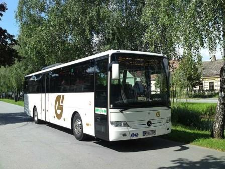 Mercedes Integro der Verkehrsbetriebe Gschwindl